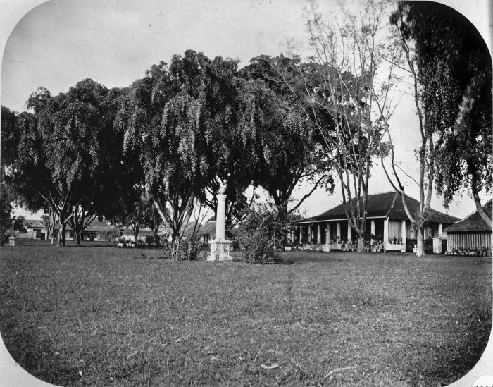 Foto. Kampement, Salatiga